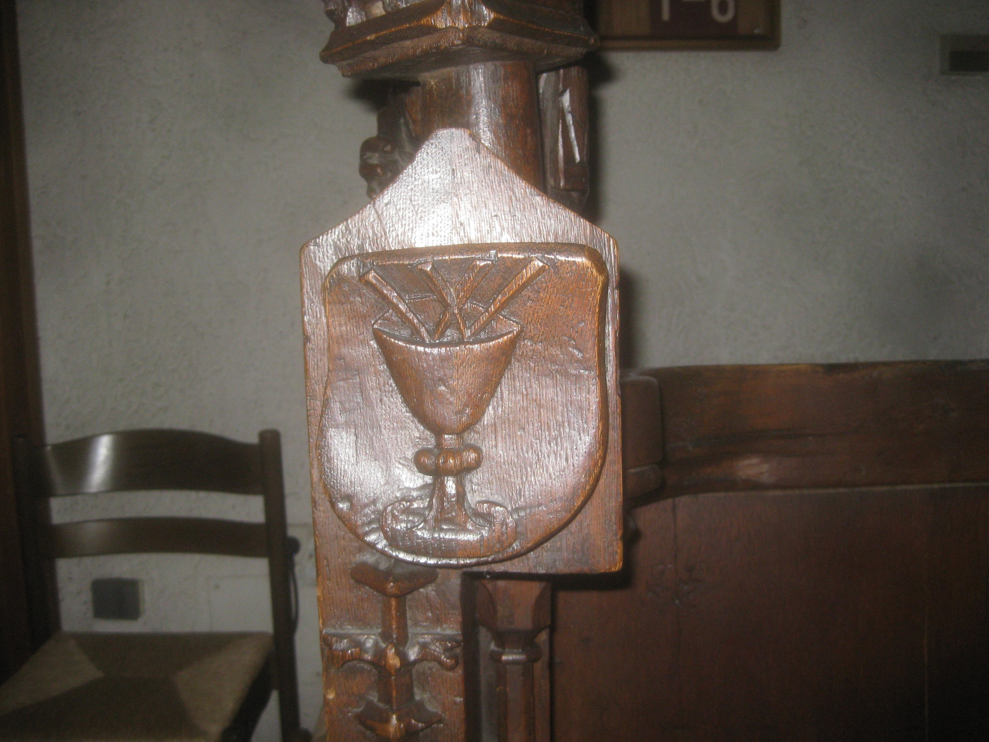 Chorgestühl der Leonhardskirche, Südostfassade, vordere Sitzreihe, vordere Schmalseite der linken Abschlusswange, Wappen mit Kelch und schwebendem Buchstaben W darüber.